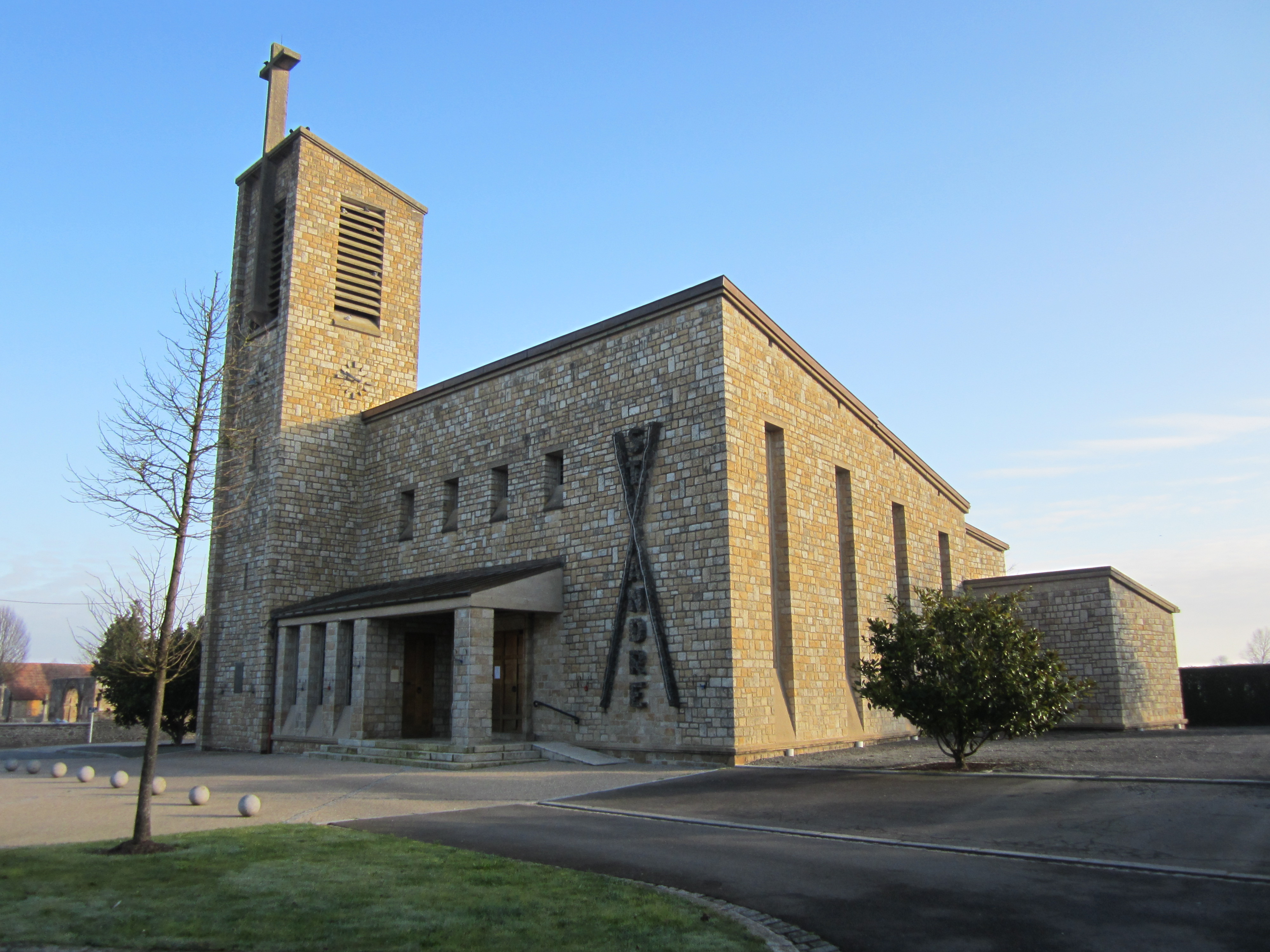 Pontaubault